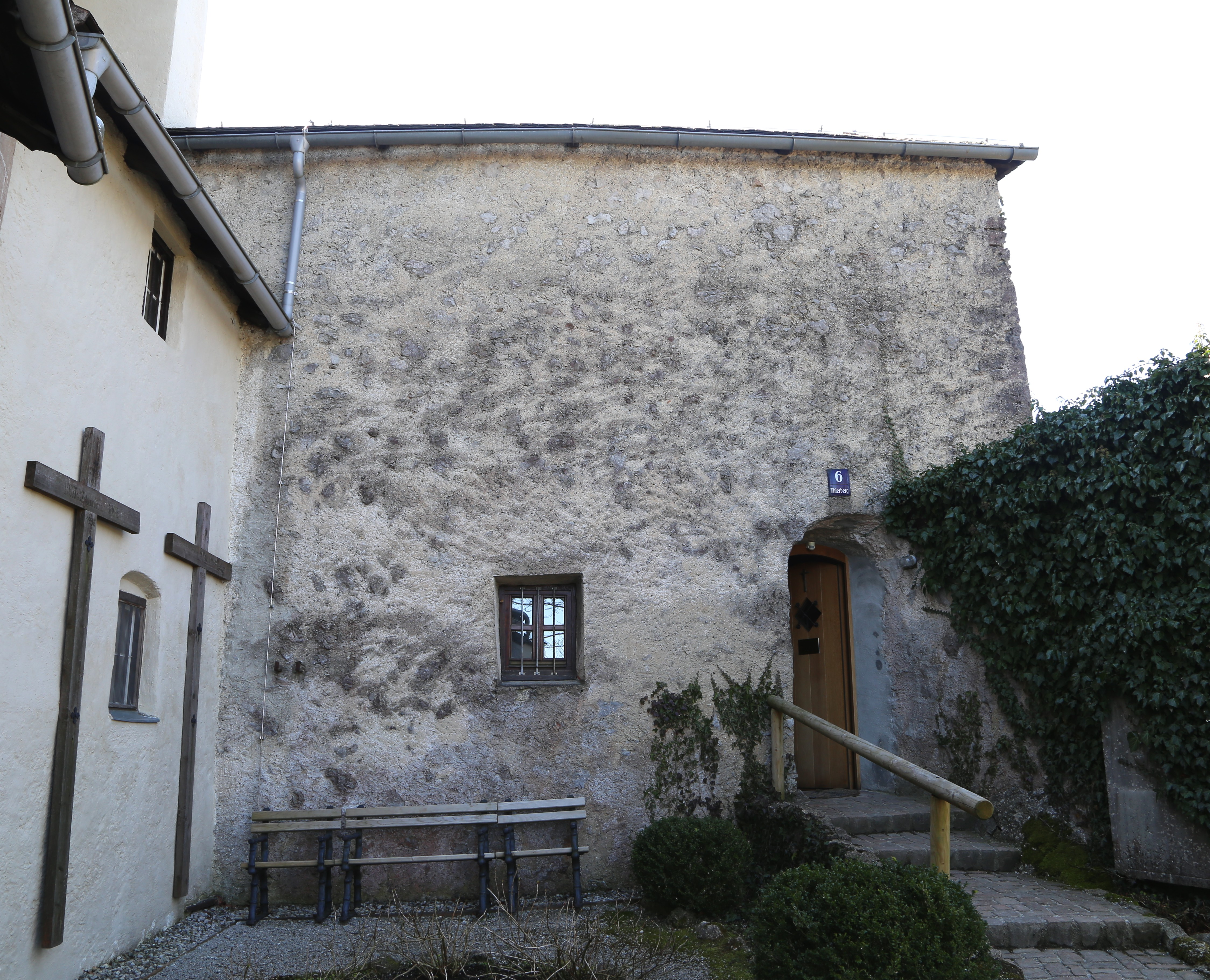 Thierberg, Kufstein; Wallfahrtskapelle This media shows the remarkable cultural object in the Austrian state of Tyrol listed by the Tyrolean Art Cadastre with the ID 110310. (on tirisMaps, pdf, more images on Commons, Wikidata)